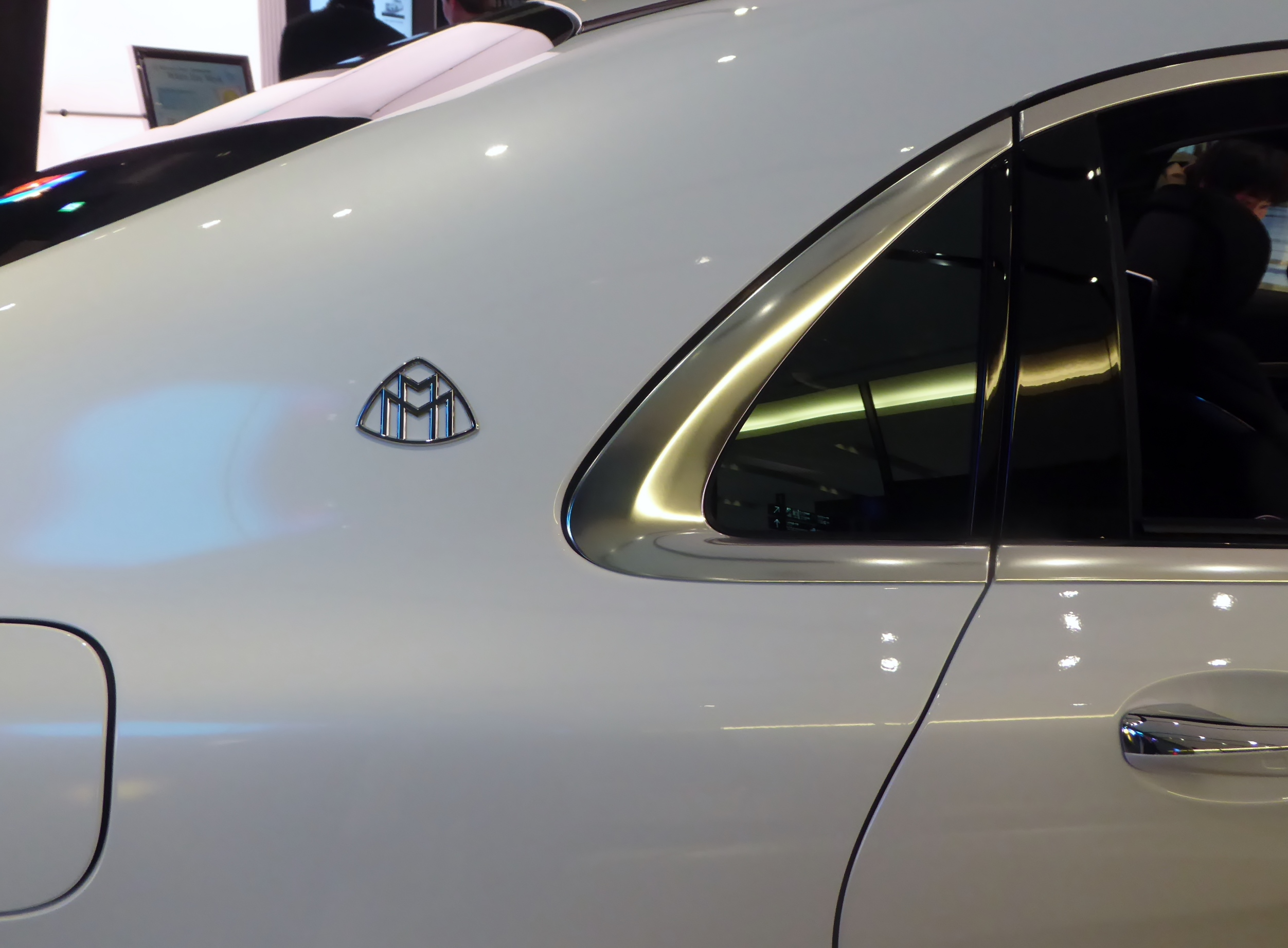 メルセデス・マイバッハのエンブレムを撮影。